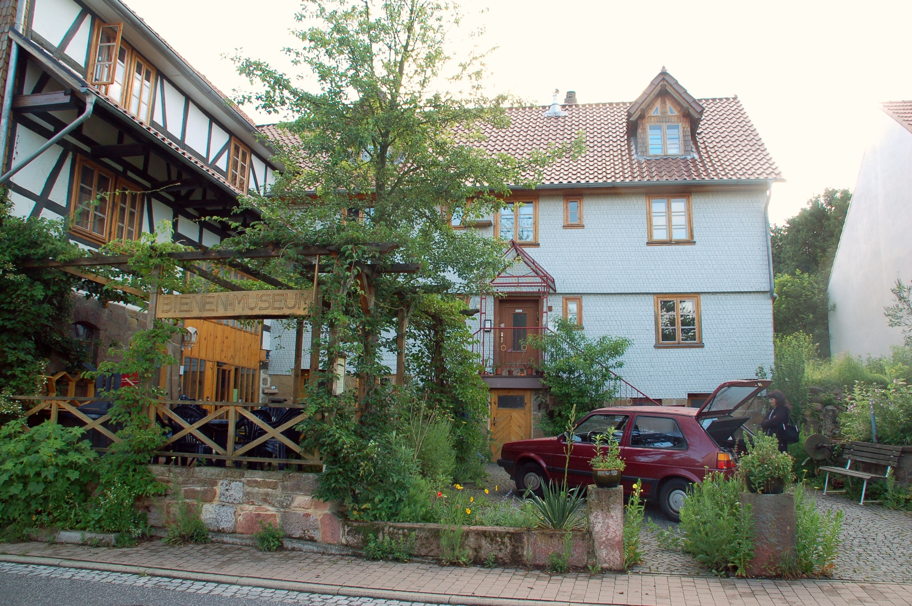 Lebendiges Bienenmuseum Knüllwald, Hessen, Deutschland